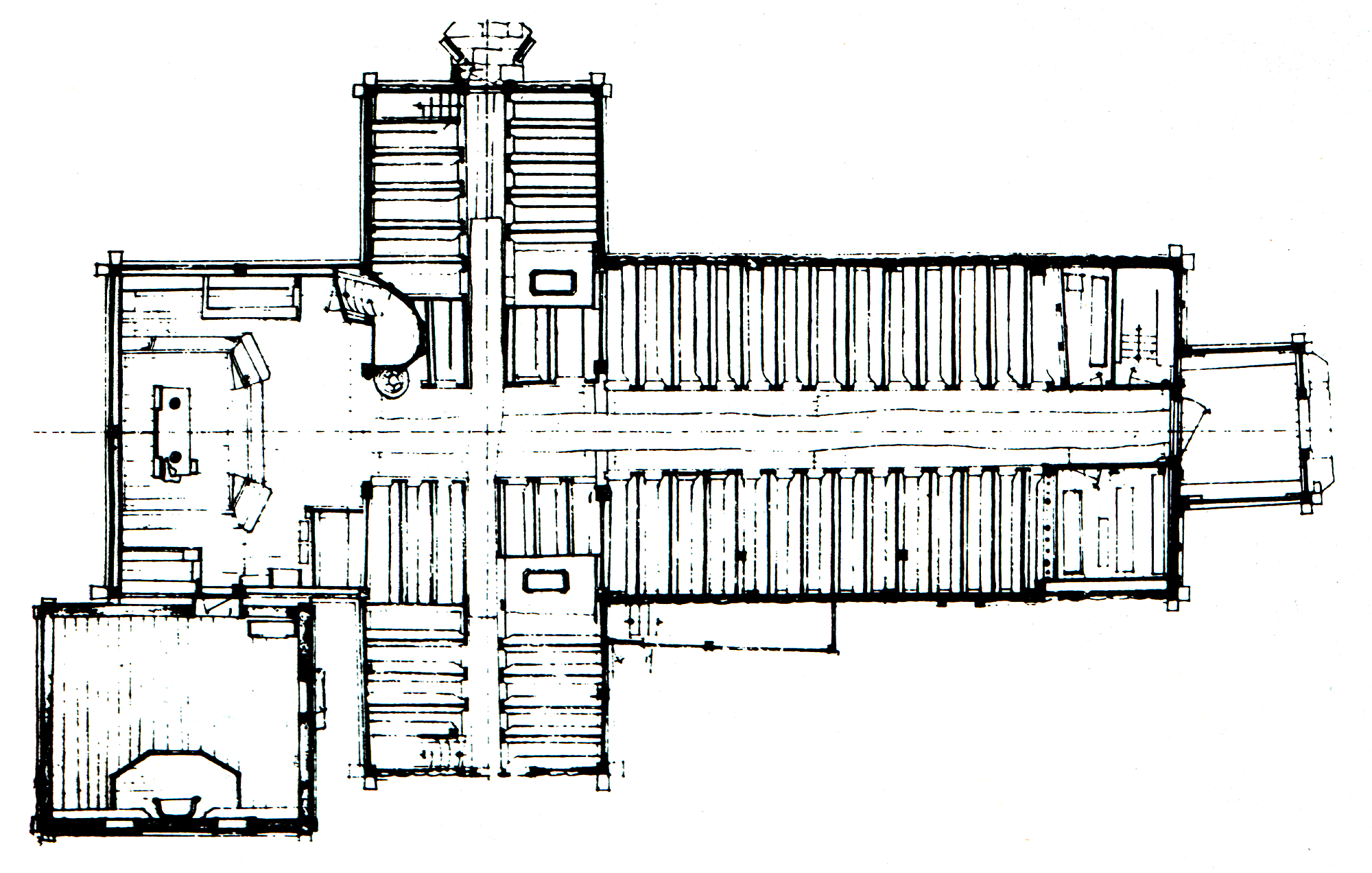 Grundriss der Kirche Vågå